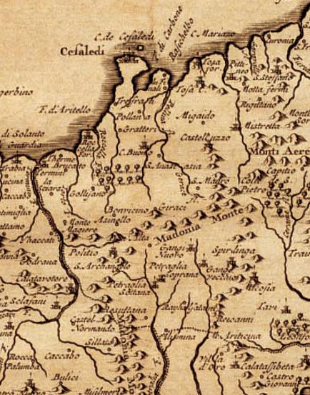 Particolare della carta geografica di Sicilia della fine del XVII secolo, rappresentante la Contea di Geraci.